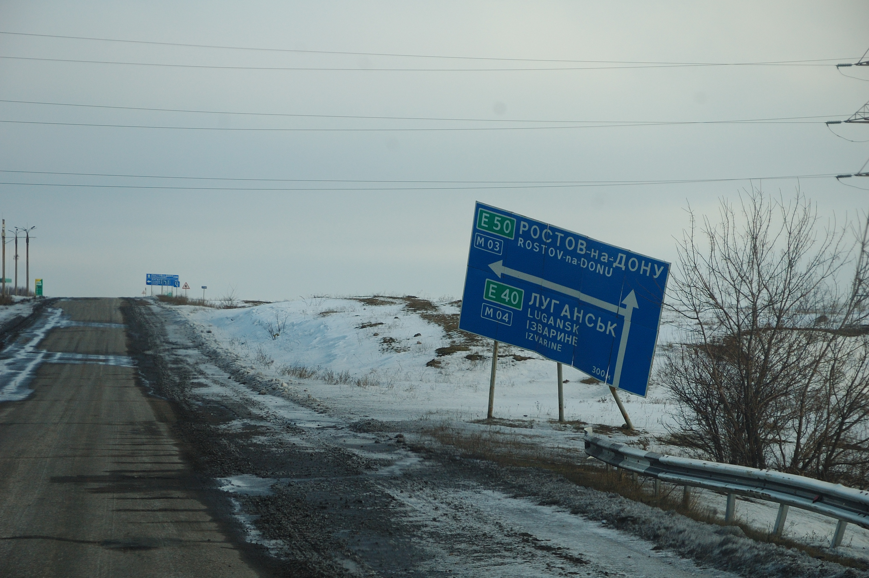 Дорога в ямах та воронках від ракет, з розбитими мостами і порожня без транспорту.